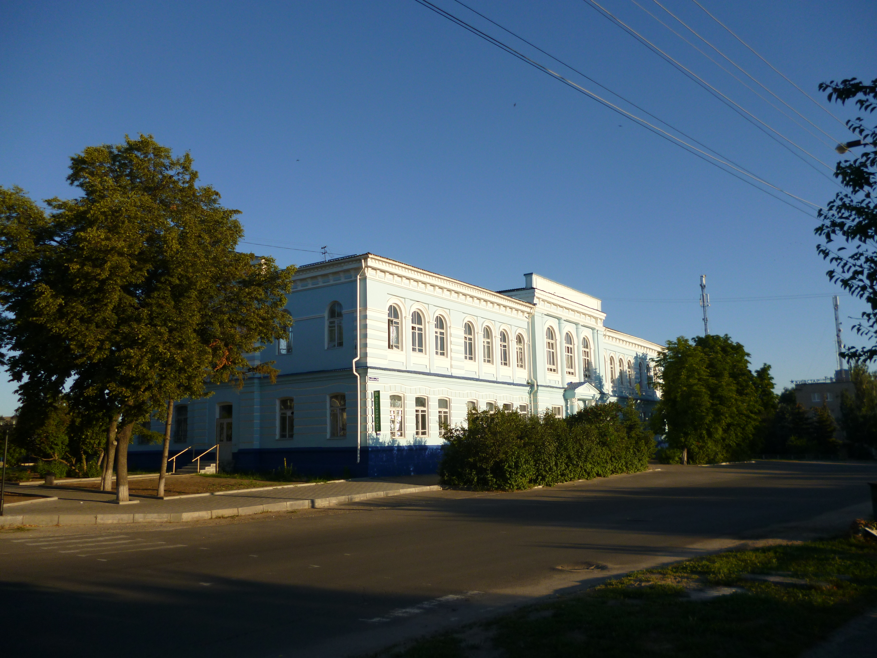 Будівля колишньої Ізюмської жіночої гімназії зі сторони вулиці Покровської